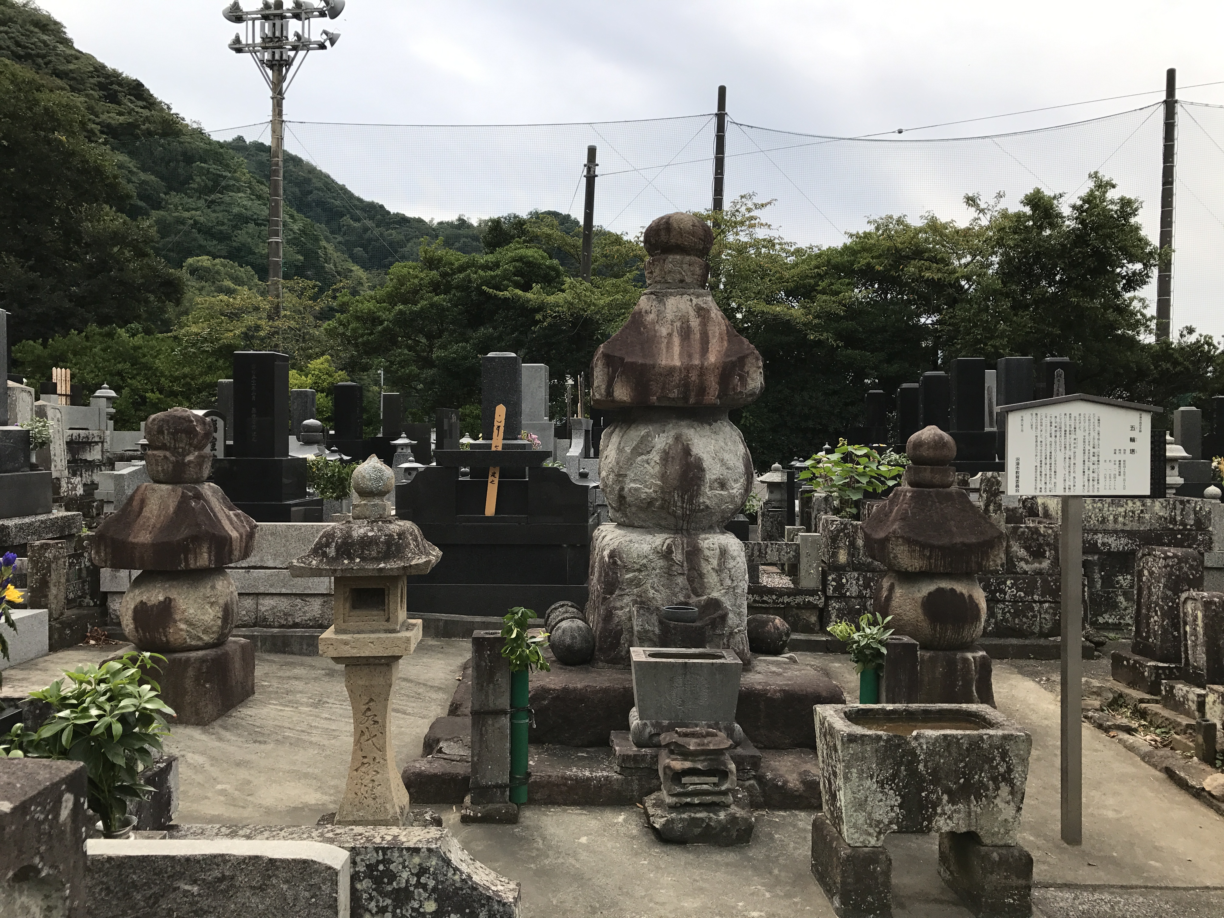 霊山寺五輪塔（静岡県沼津市）